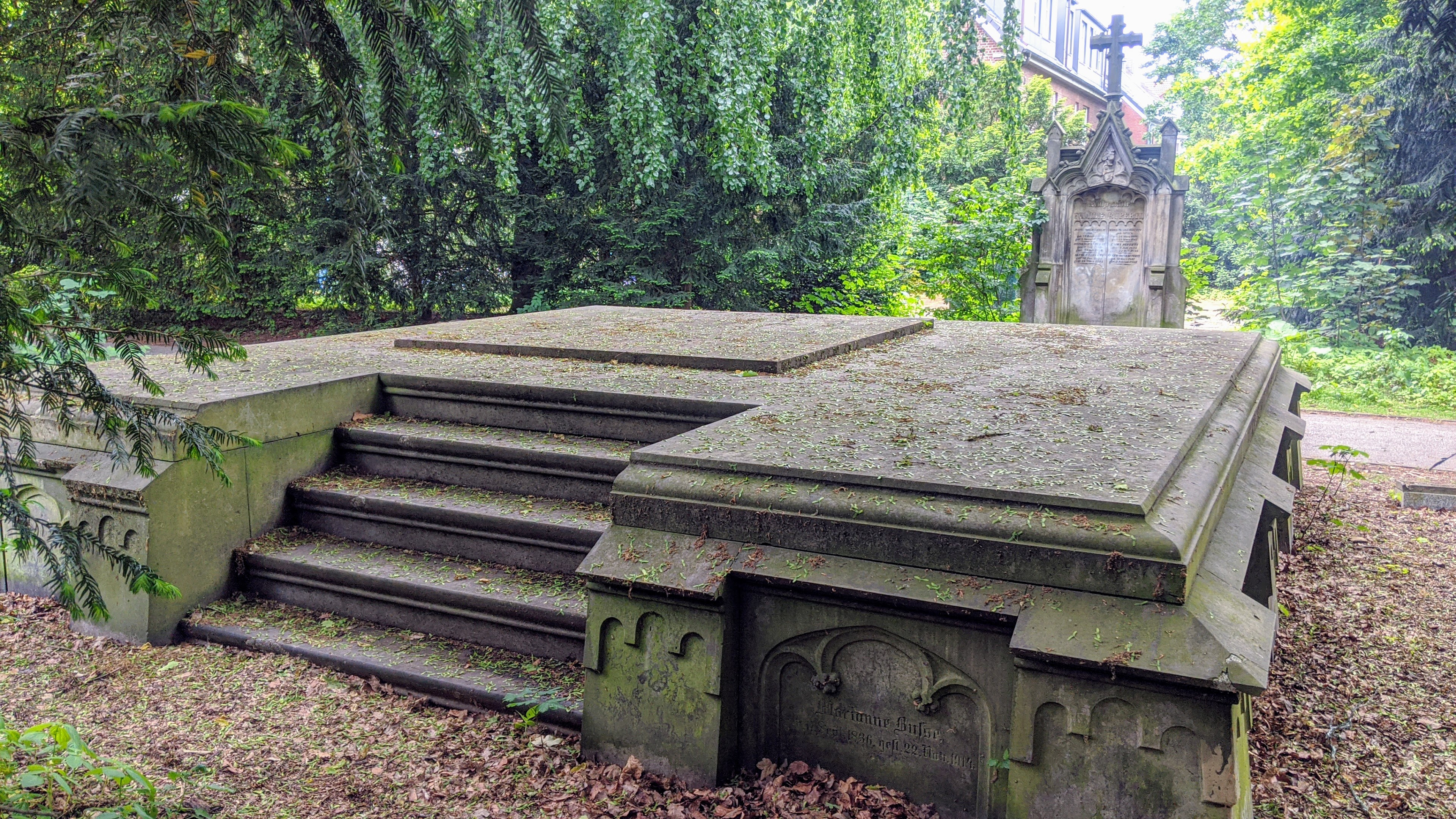 Familiengrab Merck im Jacobipark in Hamburg-Eilbek, Rückansicht mit Treppenstufen, im Hintergrund das Grabmal der Familie Ruperti